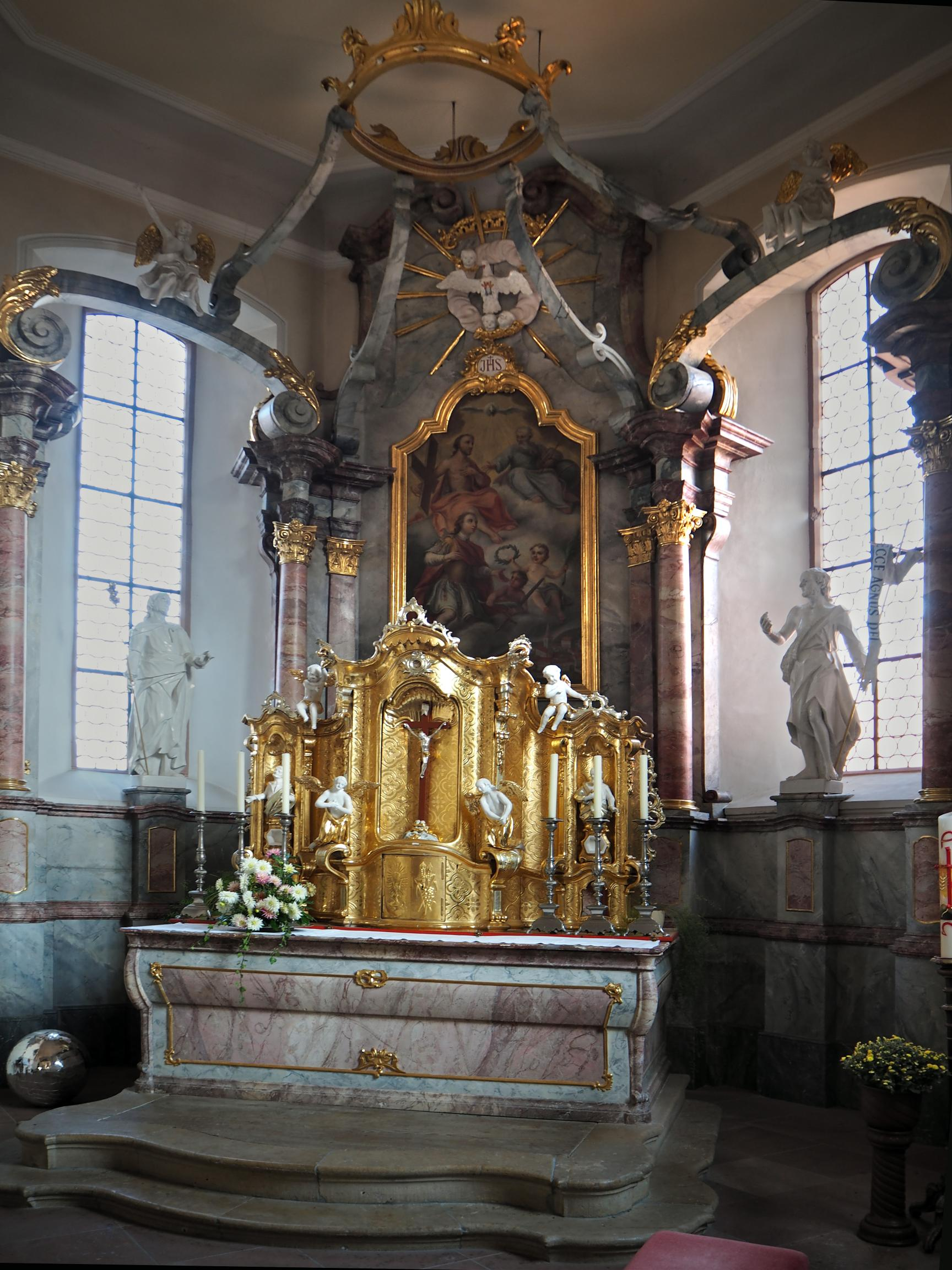 Burgheim a. K. , St. Pankratius,Choraltar, Foto von 2017